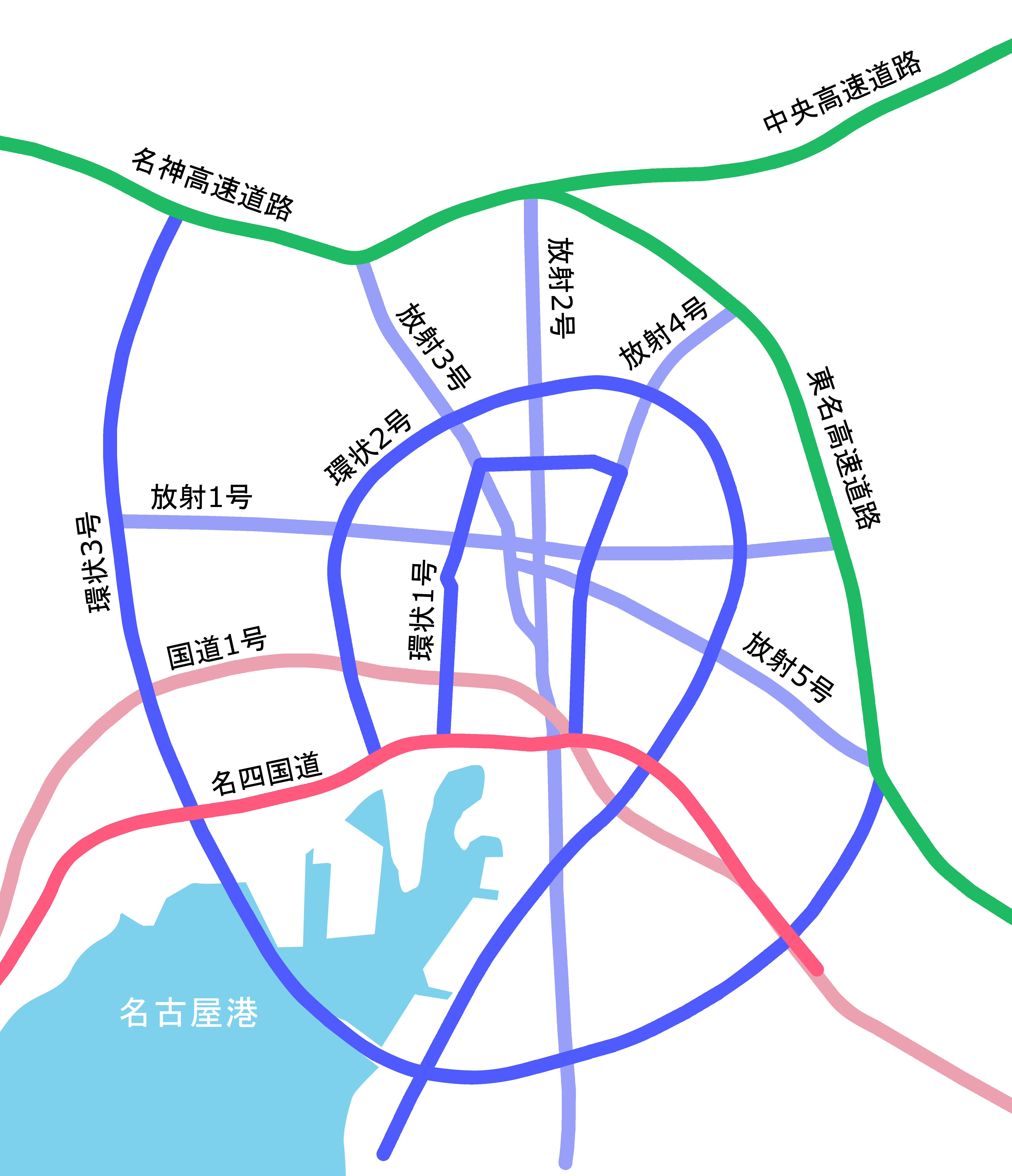 名古屋市将来計画基本要綱（1962年1月）に示された道路計画図（図-30）。 図を多少デフォルメしているが道路名称は当時のままで掲載した。